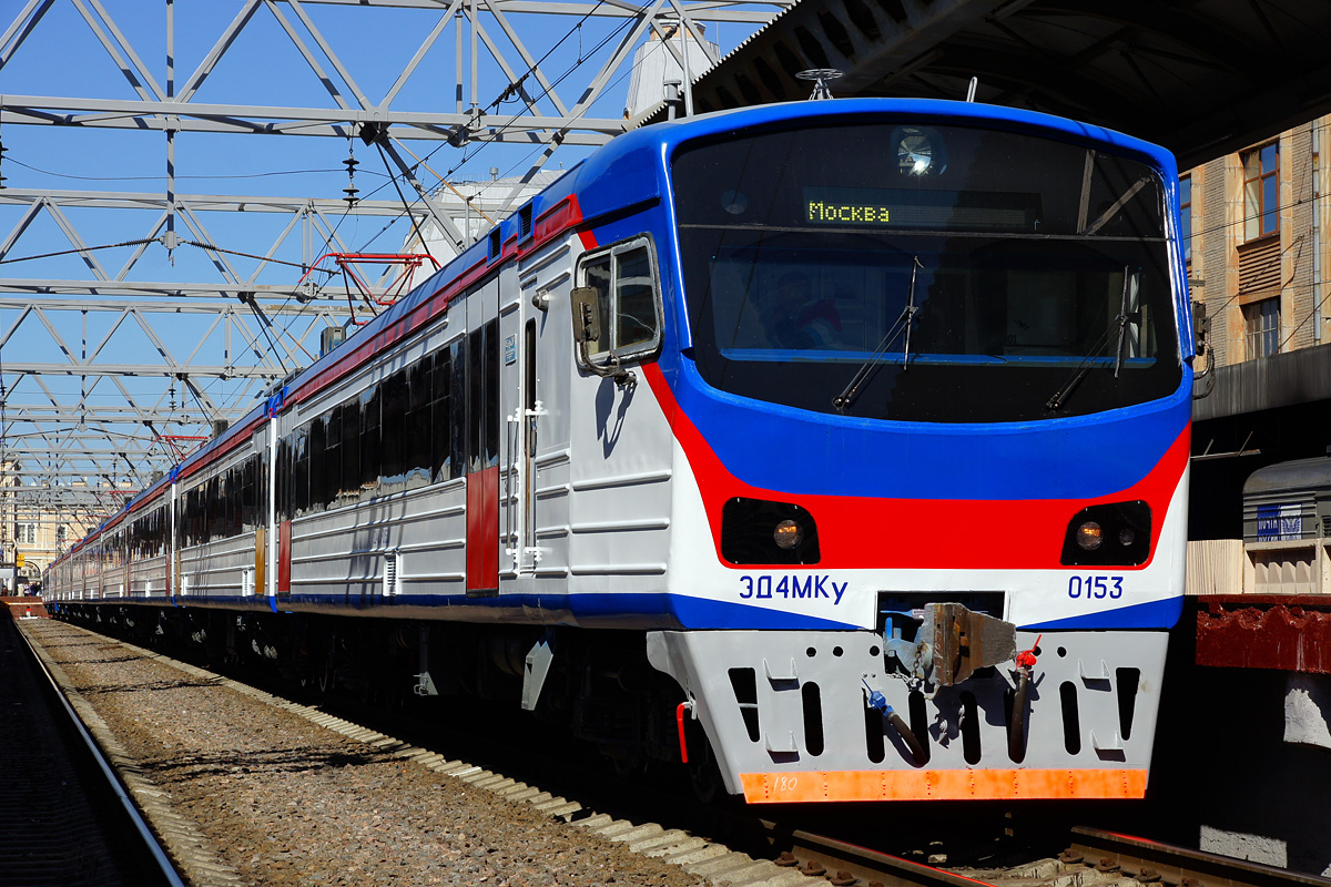 Электропоезд повышенной комфортности, построен в 11-вагонной составности Эксплуатация: c завода поступил в собственность ООО «Пассажирские перевозки» до 2009 — работал на маршруте Санкт-Петербург — Москва техническое обслуживание проводилось в ТЧ-10 ОКТ СПб-Московское (Металлострой) 03.2010 — поступил в ТЧ-4 СЕВ Данилов 01.04.2010—31.01.2013 — курсировал по маршруту Ярославль — Москва (экспресс) техническое обслуживание проводилось в ТЧ-4 СЕВ Данилов 02.2013 — передан в ТЧ-10 ОКТ СПб-Московское (Металлострой) 06.2016 — продан ОАО «Центральная ППК» с 08.08.2017 — работает на маршруте Москва — Усово Техническое обслуживание проходит в ТЧ-4 Железнодорожная Мск Ремонт: 10.2009 — КР-1 Октябрьский ЭВРЗ 09.2012 — ТР-3 ТЧ-4 СЕВ Данилов 02.2013 — ТР-2 ТЧ-6 ОКТ Крюково 04.2014 — КР-2 Октябрьский ЭВРЗ 01.2015 — ТР-2 ТЧ-15 ОКТ СПб-Балтийский